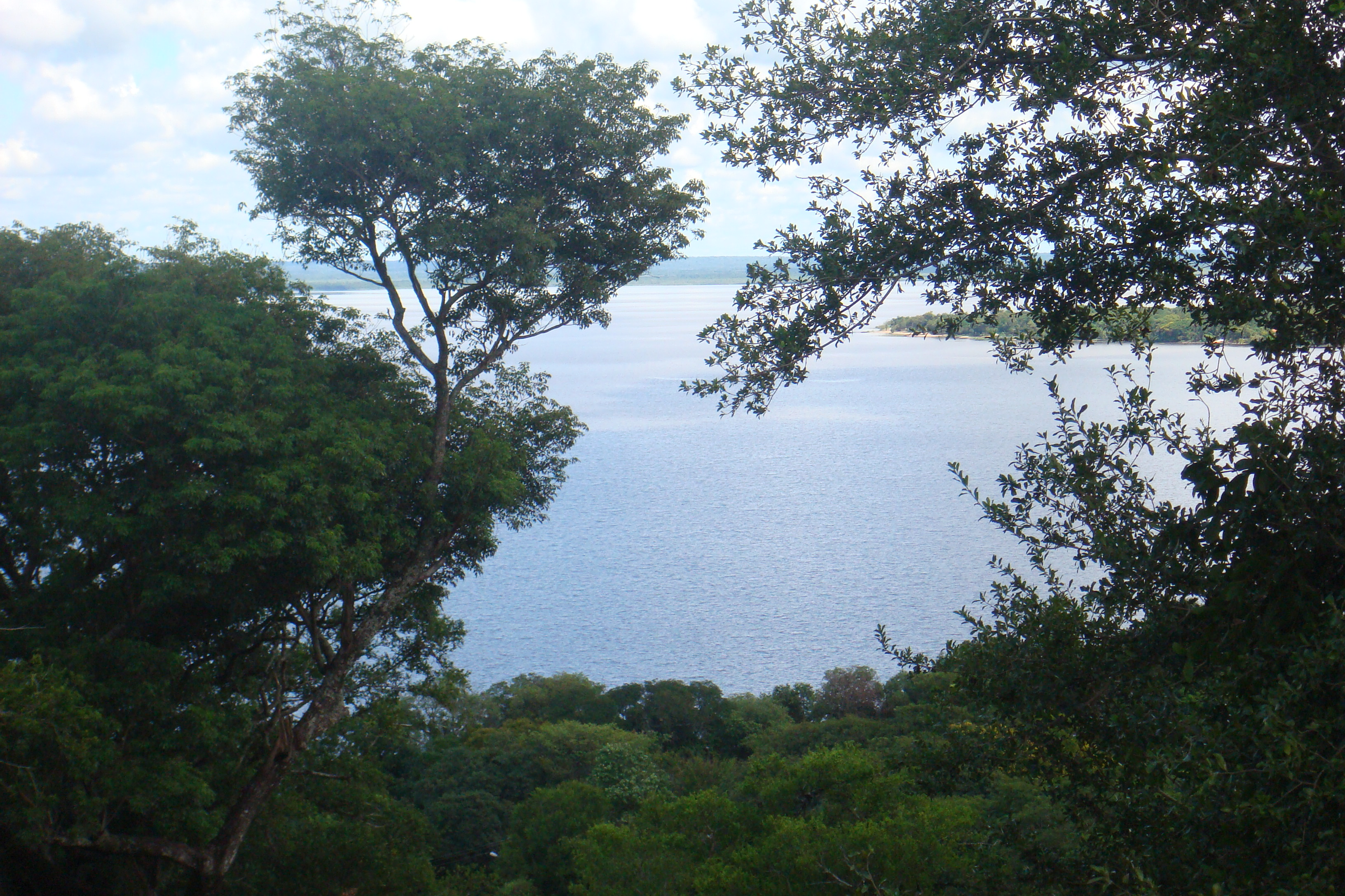 Vista al Lago Ypacarai